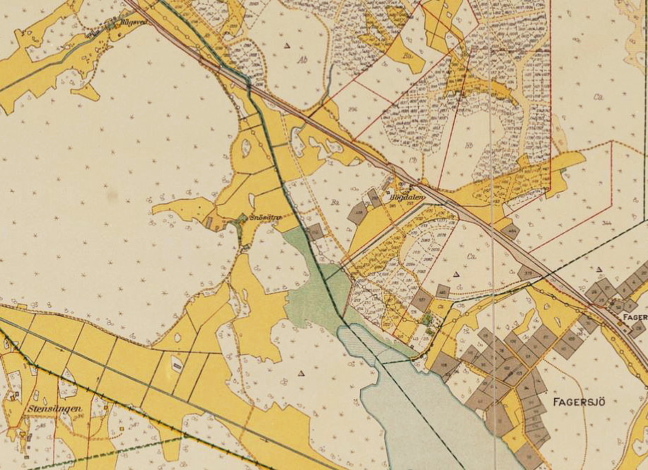 Detalj visande Rågsved, Snösätra, Högdalen mm